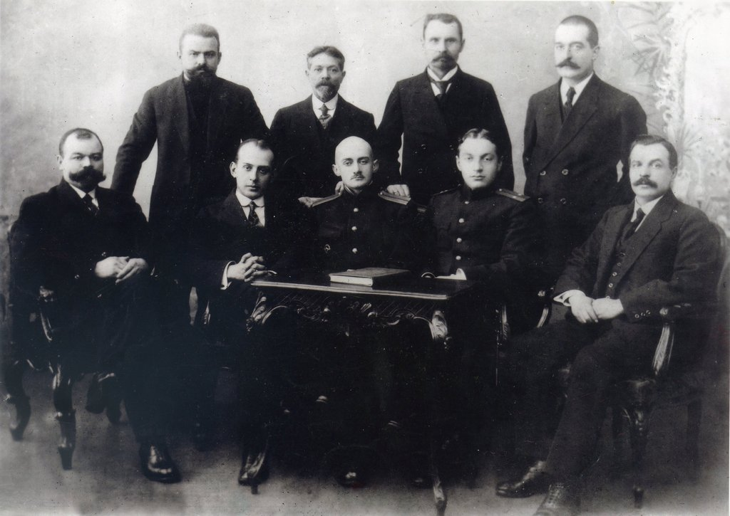 Фото із Гамбурзького університету, зроблене під час стажування у Німеччині